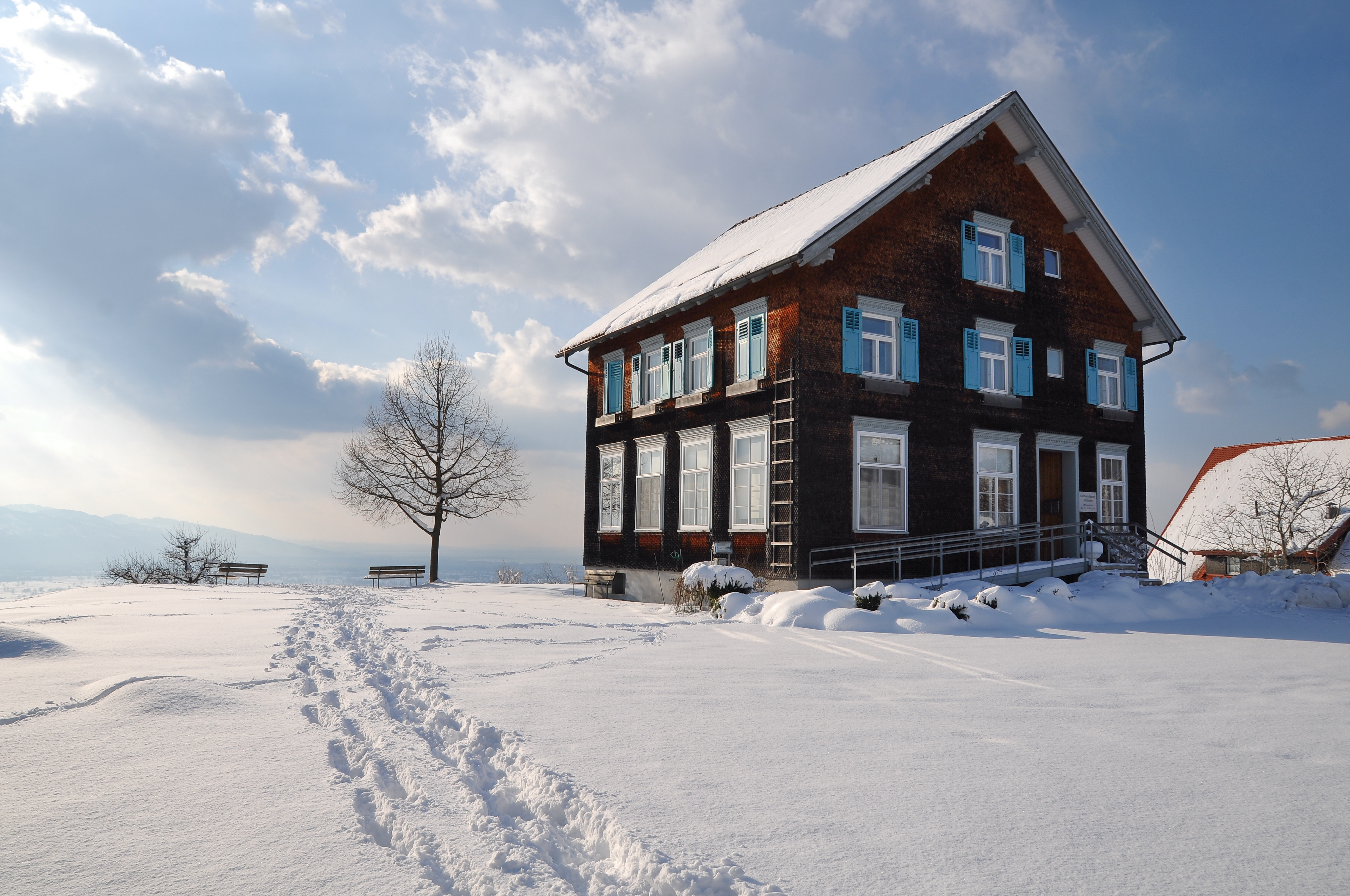 Das Gemeindeamt im Kirchdorf von Bildstein.Das Objekt steht unter Denkmalschutz.